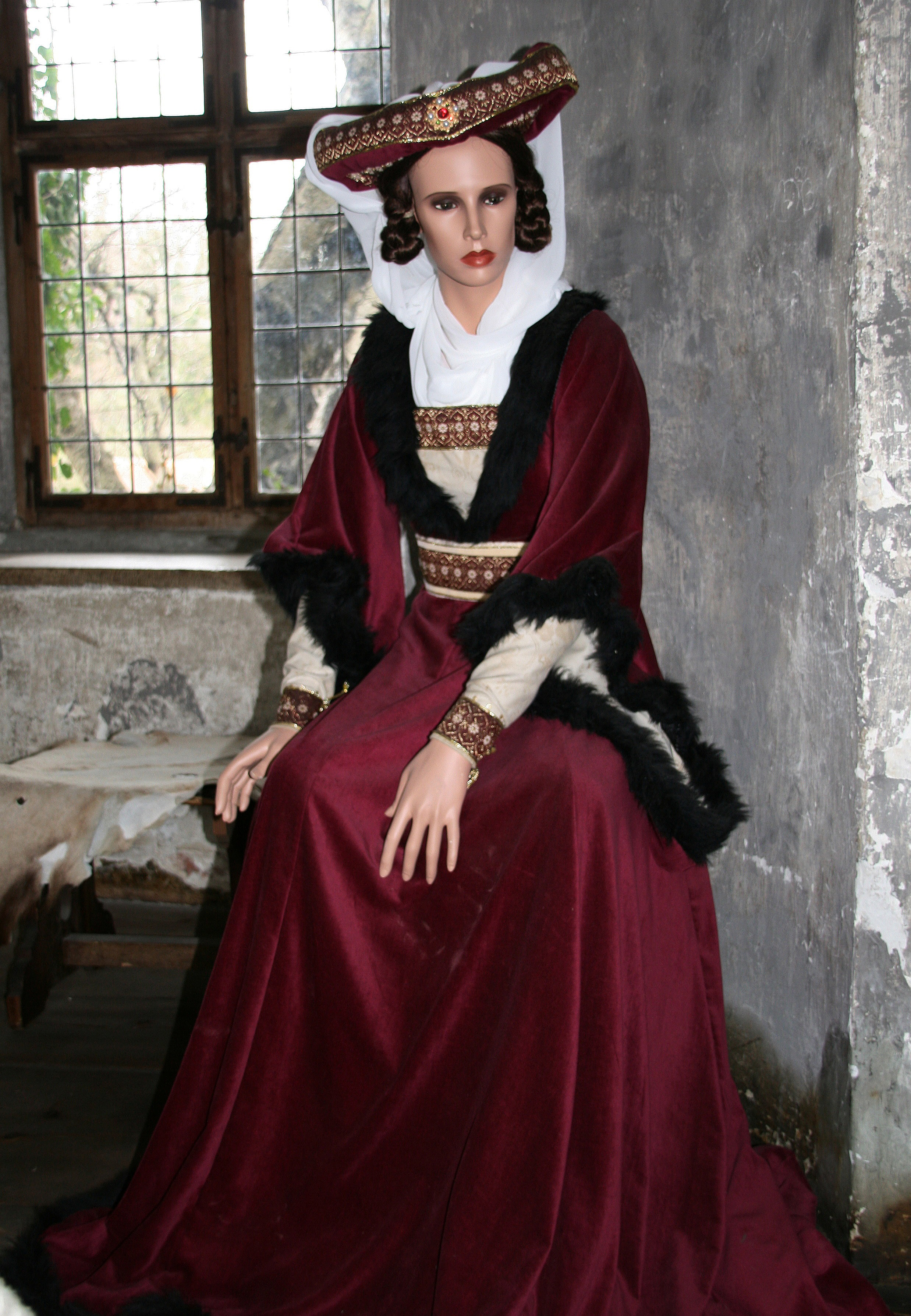 Hofkleidung in der Burg in Meersburg am Bodensee.